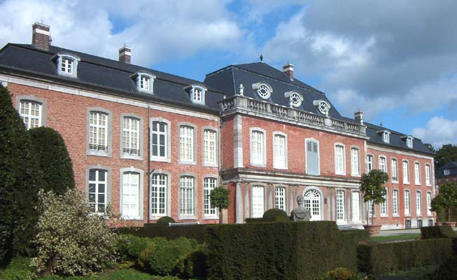 Kasteel van Heks (gemeente Heers in Belgisch Limburg)